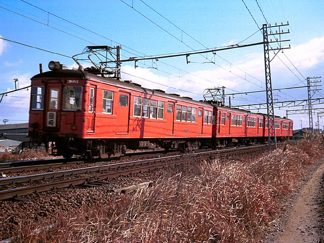 名鉄3880系3881編成。元東急3700系で、オイルショック後の輸送事情改善を目的に1975年より順次導入された。名古屋本線知立 - 牛田間にて撮影。